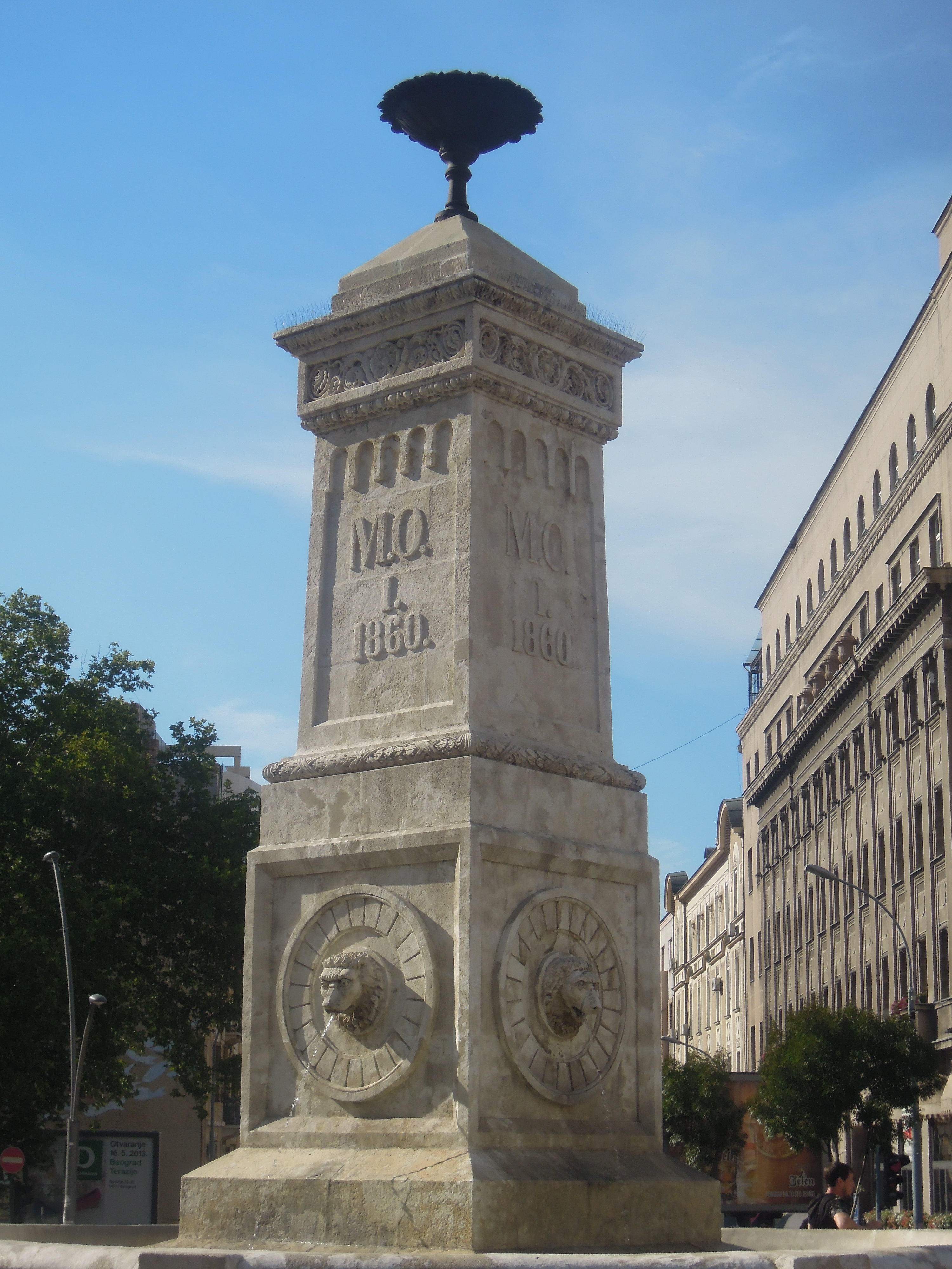 Terazijska česma.